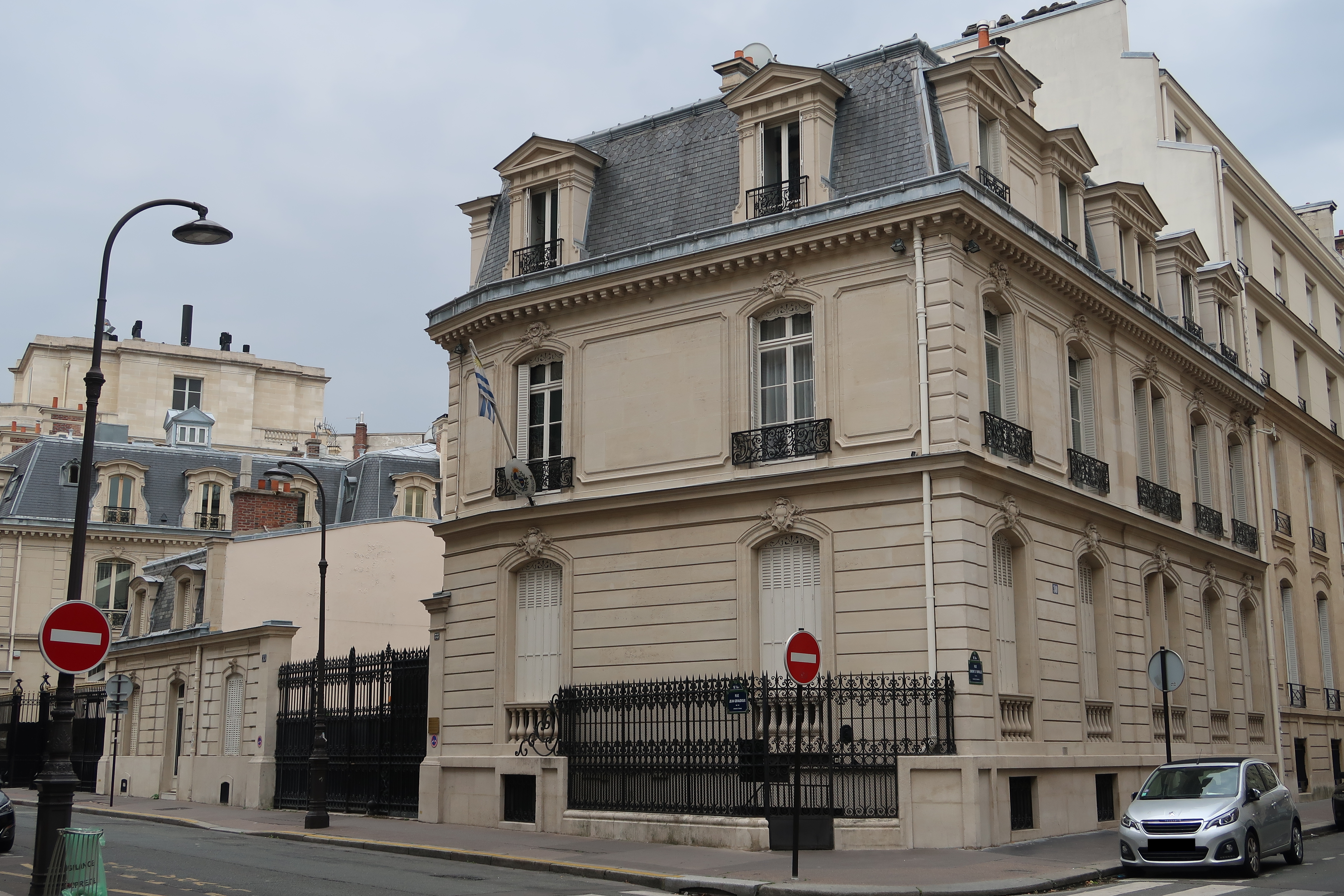 Ambassade d'Uruguay en France, 33 rue Jean-Giraudoux (Paris 16e).